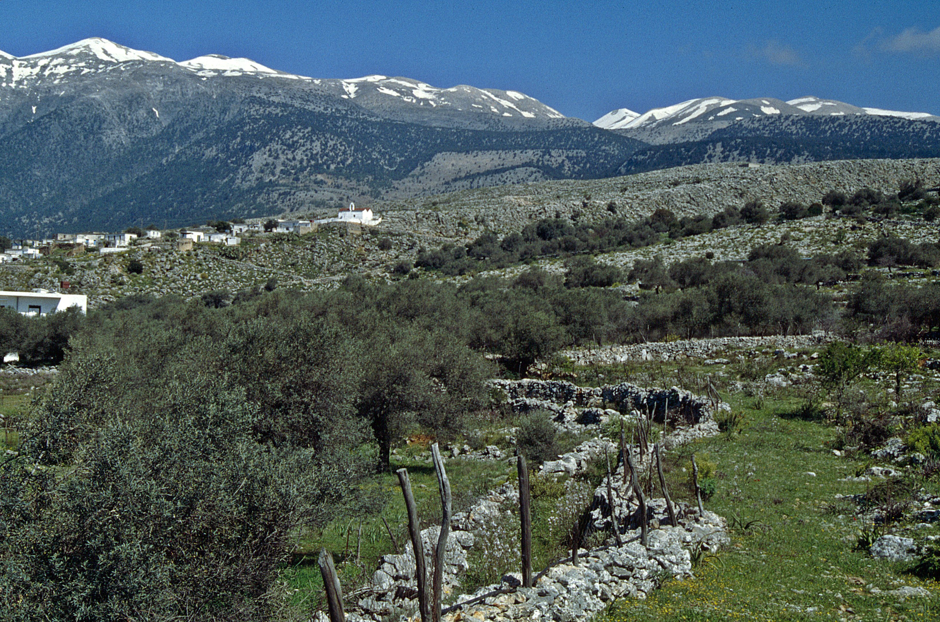 Anopoli